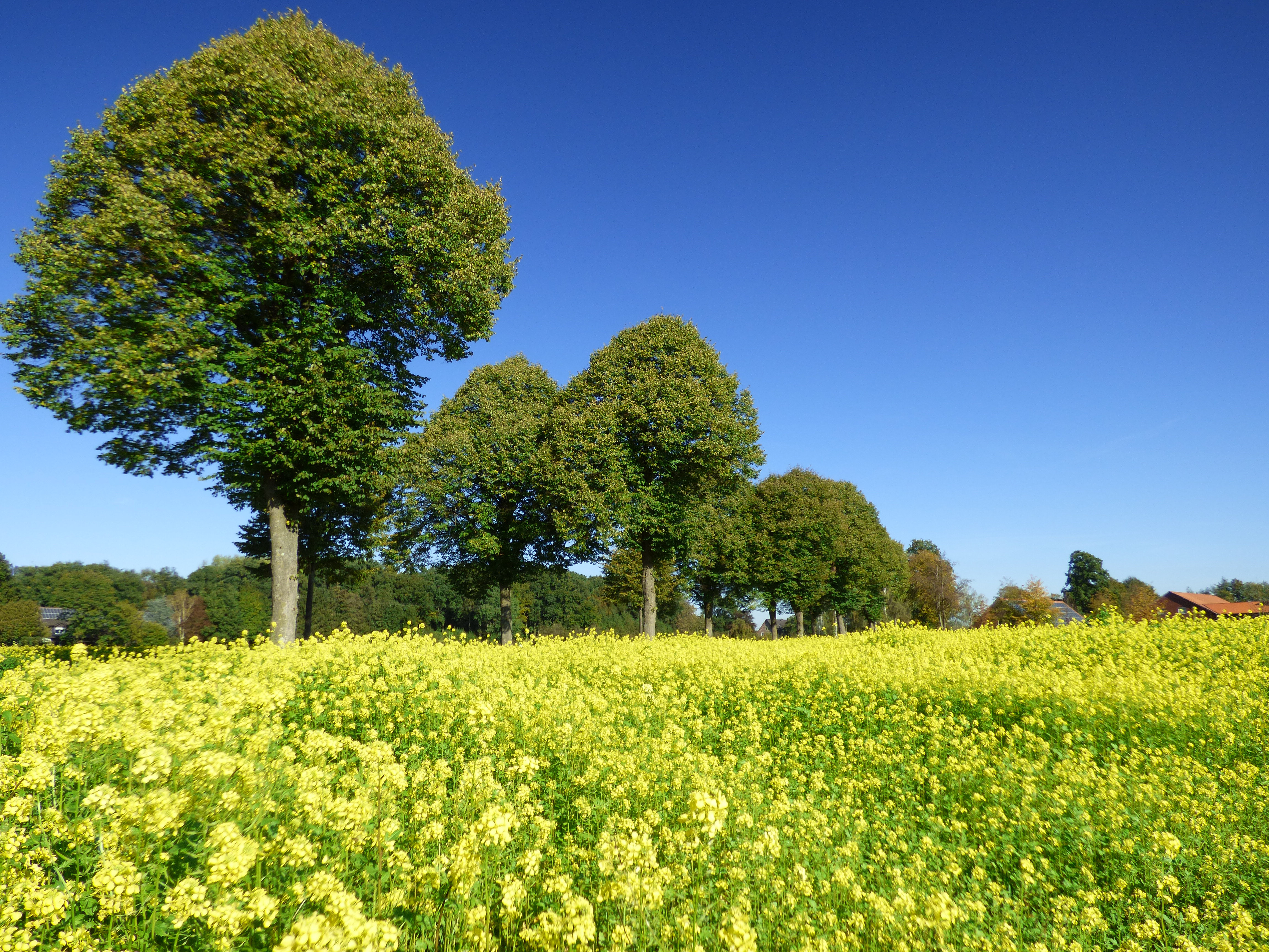 Senffeld in Gescher-Büren